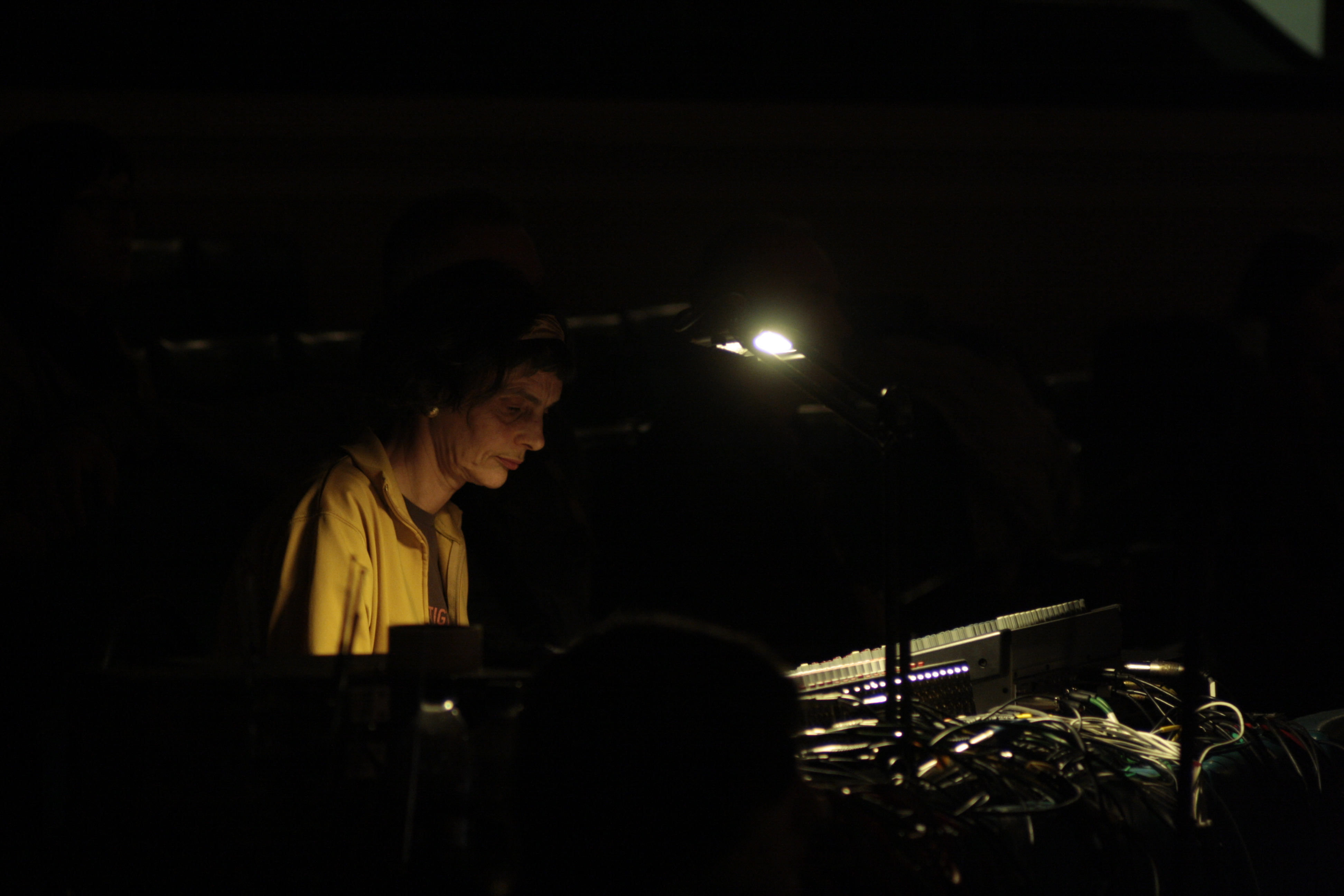 International Music of Youth Forum 2011, Kyiv